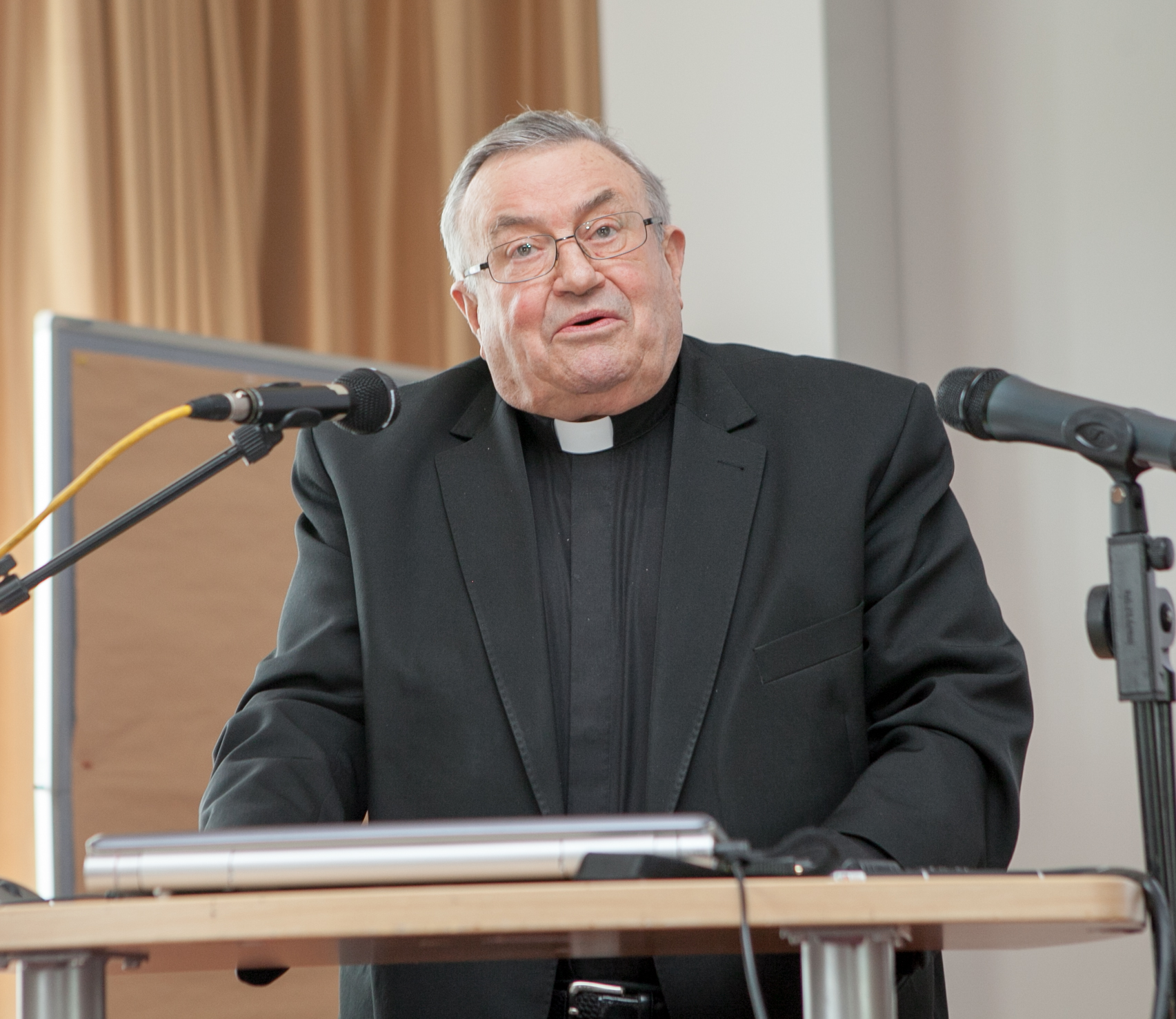 Karl Kardinal Lehmann bei seinem Festvortrag am 13. Juni 2015 anlässlich des 24. Diabetes-Symposiums in Bad Neuenahr.